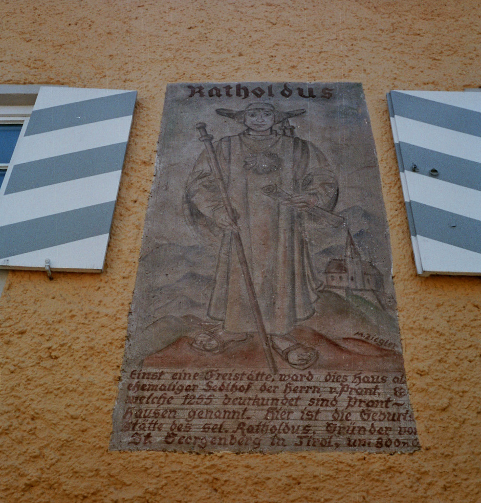 Der selige Ratholdus, Gründer eines Klosters auf dem St. Georgenberg. Wandmalerei oder Fresko an der Nordwand des ehemaligen Schlosses Prantshausen in Bad Aibling.